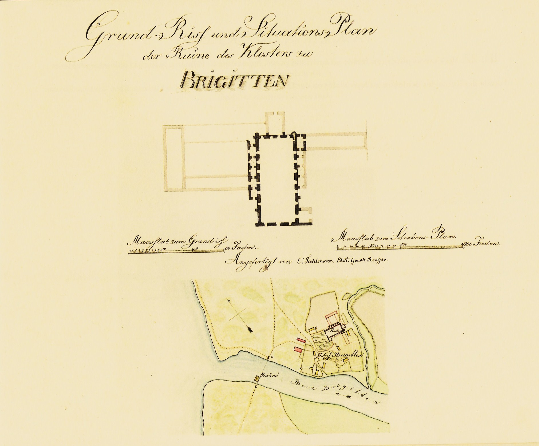 Pirita kloostri asendiplaan